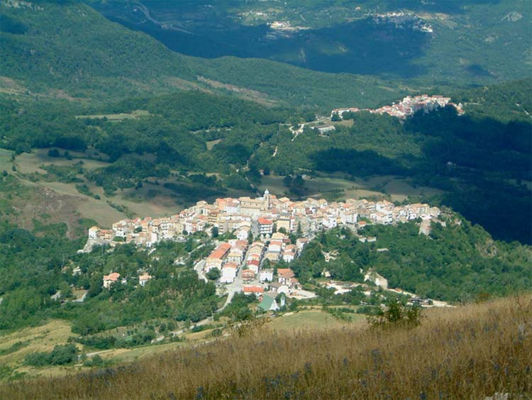 Foto del pueblo, Roio del Sangro